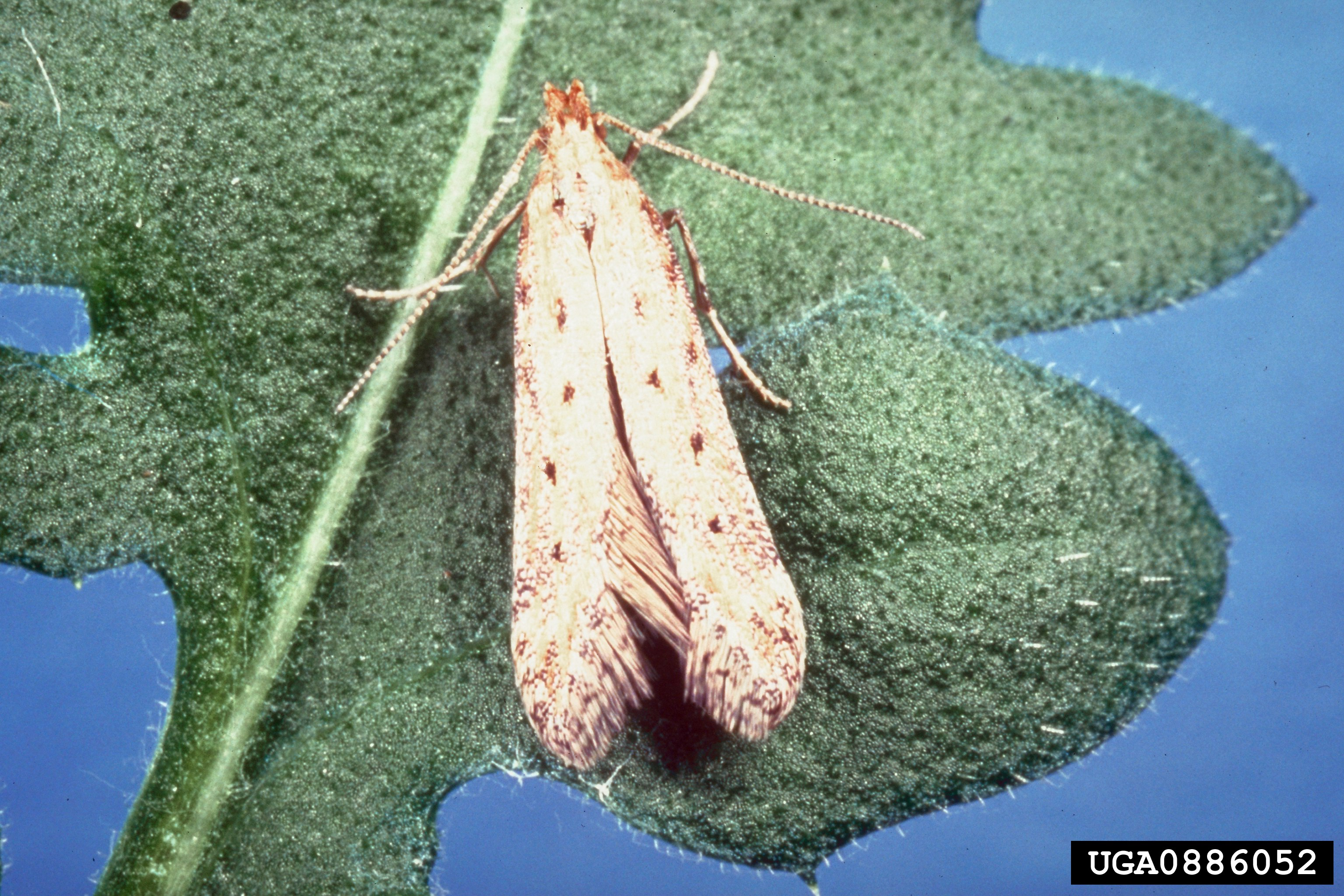 Metzneria paucipunctella